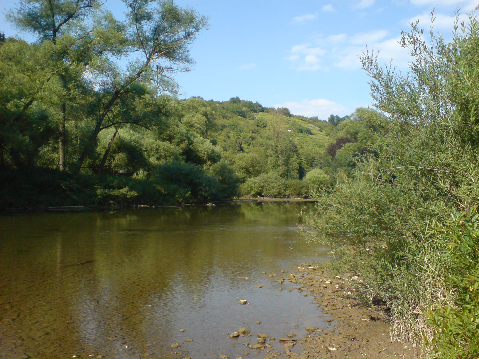 Die Jagst an der Möckmühler Jagstinsel, niedriger Wasserstand und offenliegende Kiesbänke.